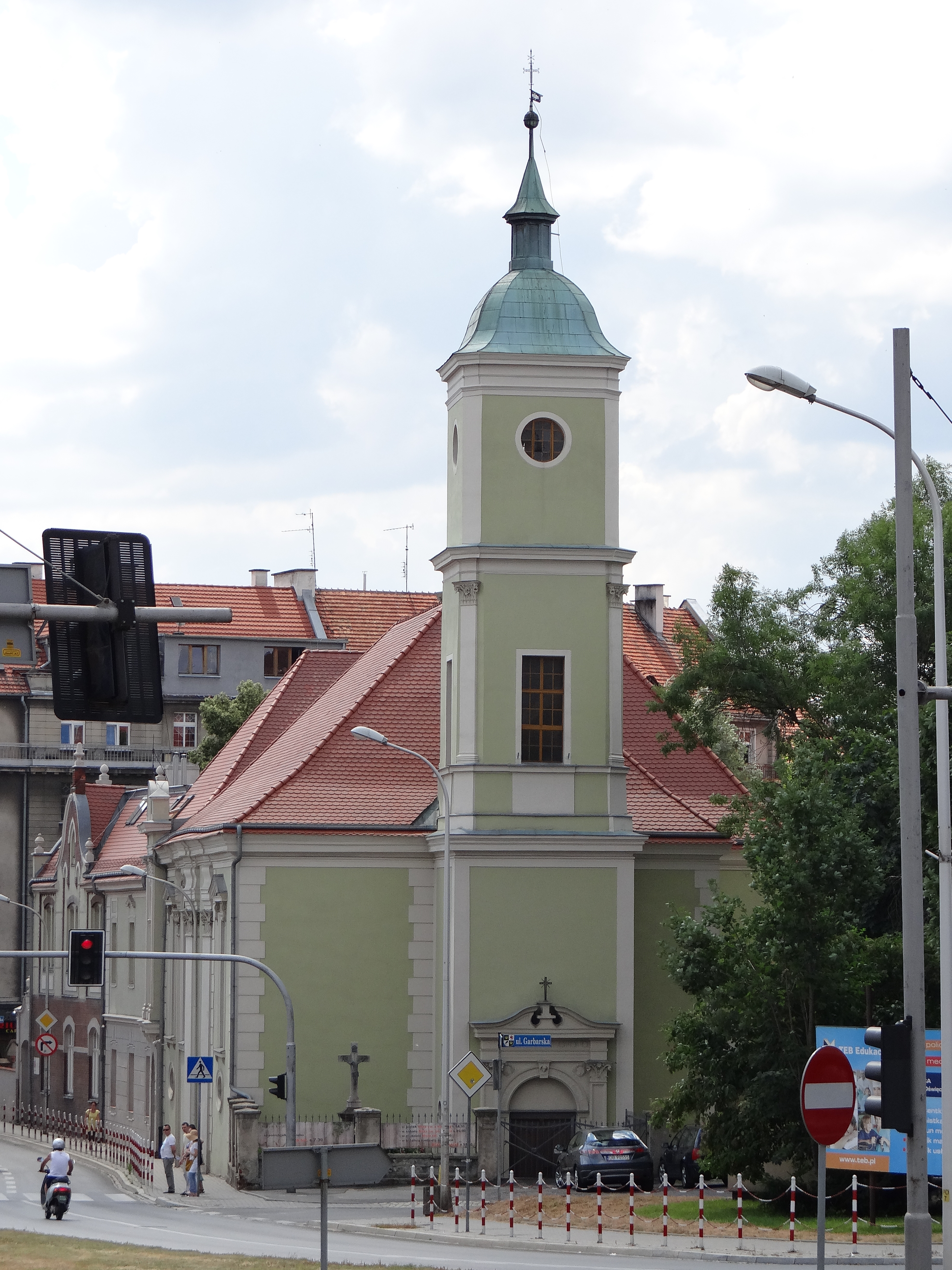 Świdnica, kościół pw. św. Krzyża, 1720, 1865-1868